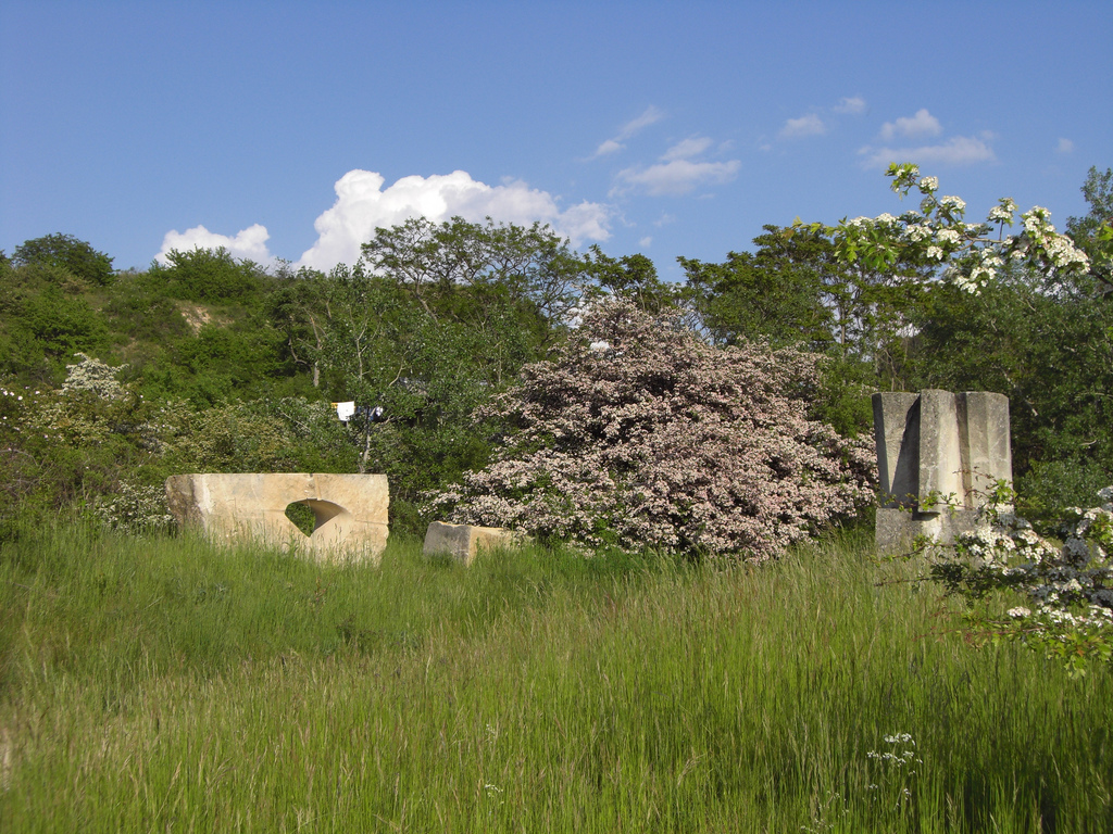 Mai 08 am Symposionshügel7 in Sankt Margarethen/Austria - links: Werk vom Symposium der Alanus Hochschule, 2008, rechts: Leo Kornbrust, 1967